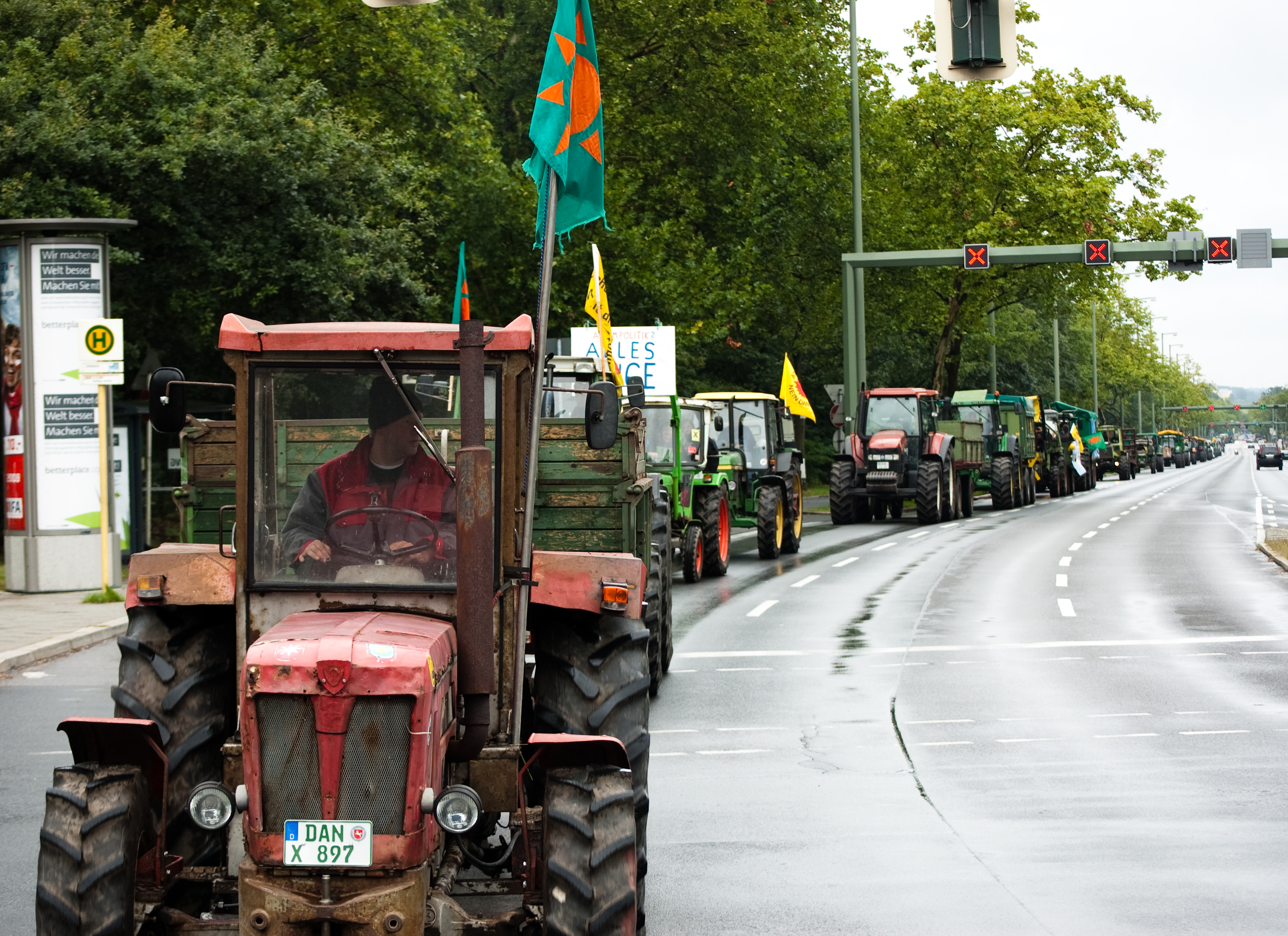 Anti-Atom-Treck zur Demo „Mal richtig abschalten - Atomkraft? Nein danke!“ am 5. September 2009 in Berlin; Traktorenkonvoi der Bäuerlichen Notgemeinschaft Lüchow-Dannenberg unterwegs